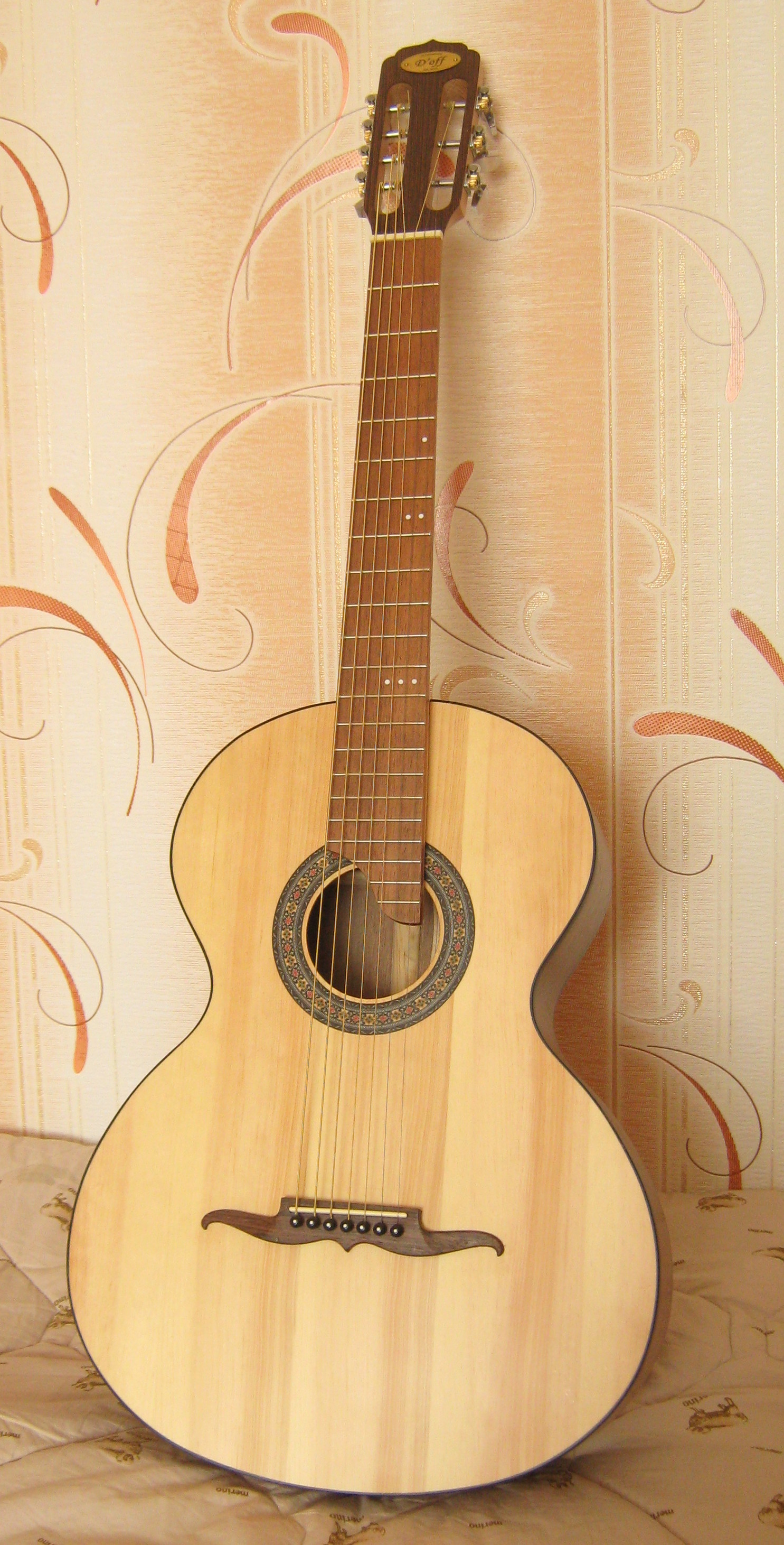 Русская семиструнная гитара. Производитель: D'off (Санкт-Петербург, Россия).